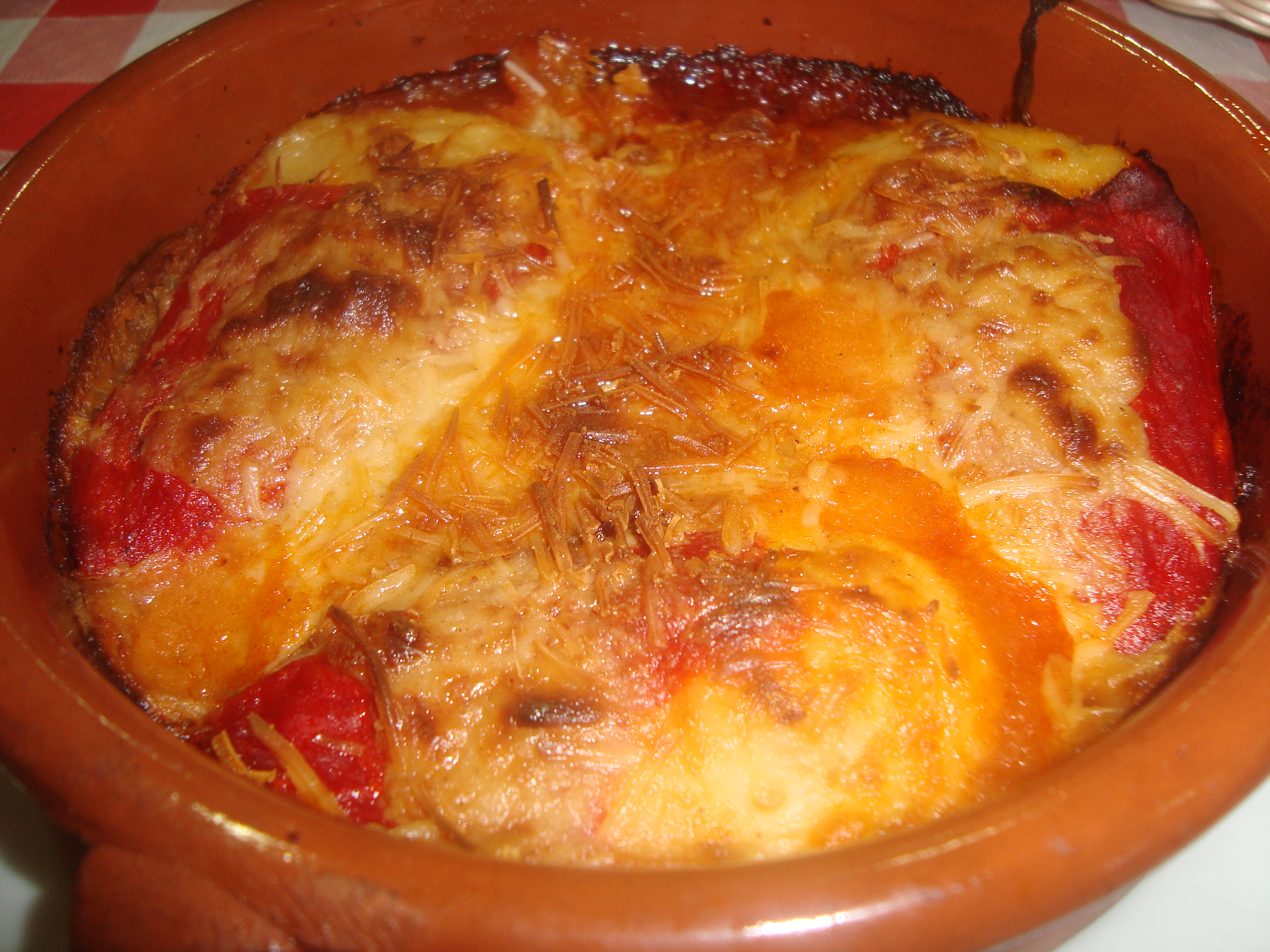 Musaka de verduras (Castellón).